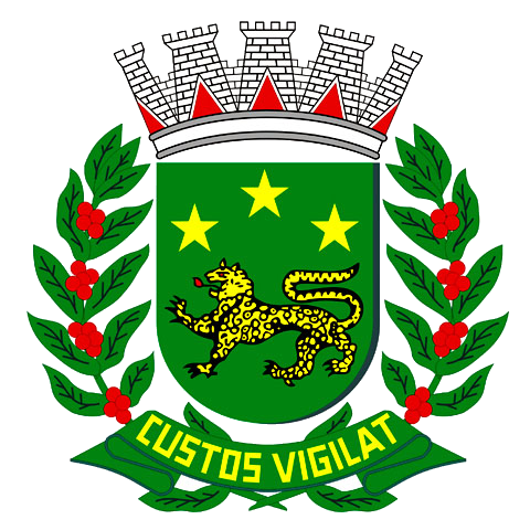 (Brasão do município de Bauru, estado de São Paulo, Brasil. Fonte: Trabalho próprio; Coat of Arms of the city of Araraquara, São Paulo state, Brazil. Own work; Emerson This work is in the public domain in Brazil for one of the following reasons: It is a work published or commissioned by a Brazilian government (federal, state, or municipal) prior to 1983.(Law 3071/1916, art. 662; Law 5988/1973, art. 46; Law 9610/1998, art. 115) It is the text of a treaty, convention, law, decree, regulation, judicial decision, or other official enactment.(Law 9610/1998, art. 8) )